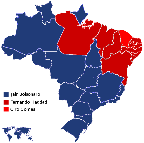 Candidat arrivé en tête par état brésilien à la présidentielle de 2018. Source : résultats officiels sur